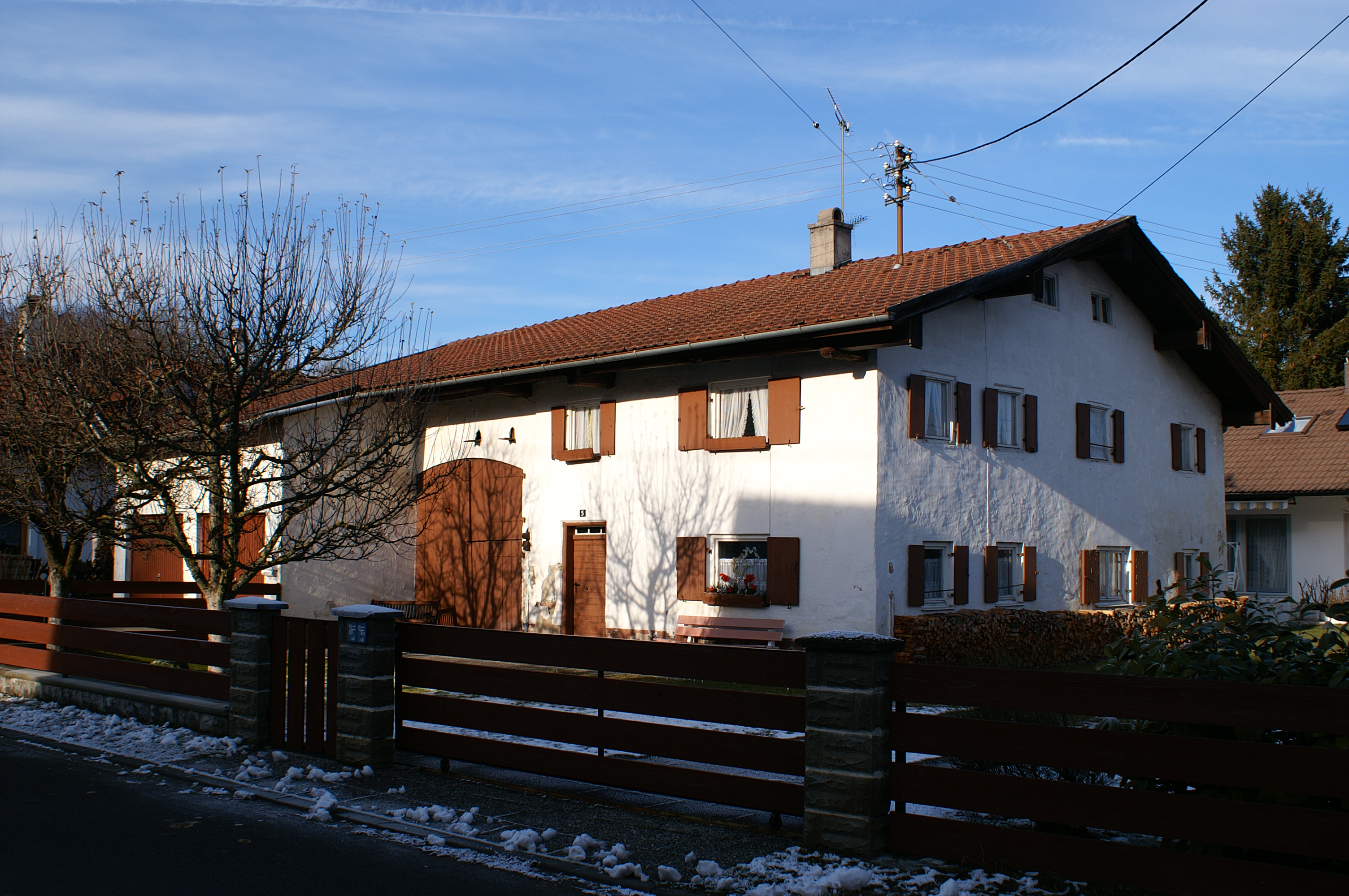 Ortsstr. 5 in Seestall, Fuchstal